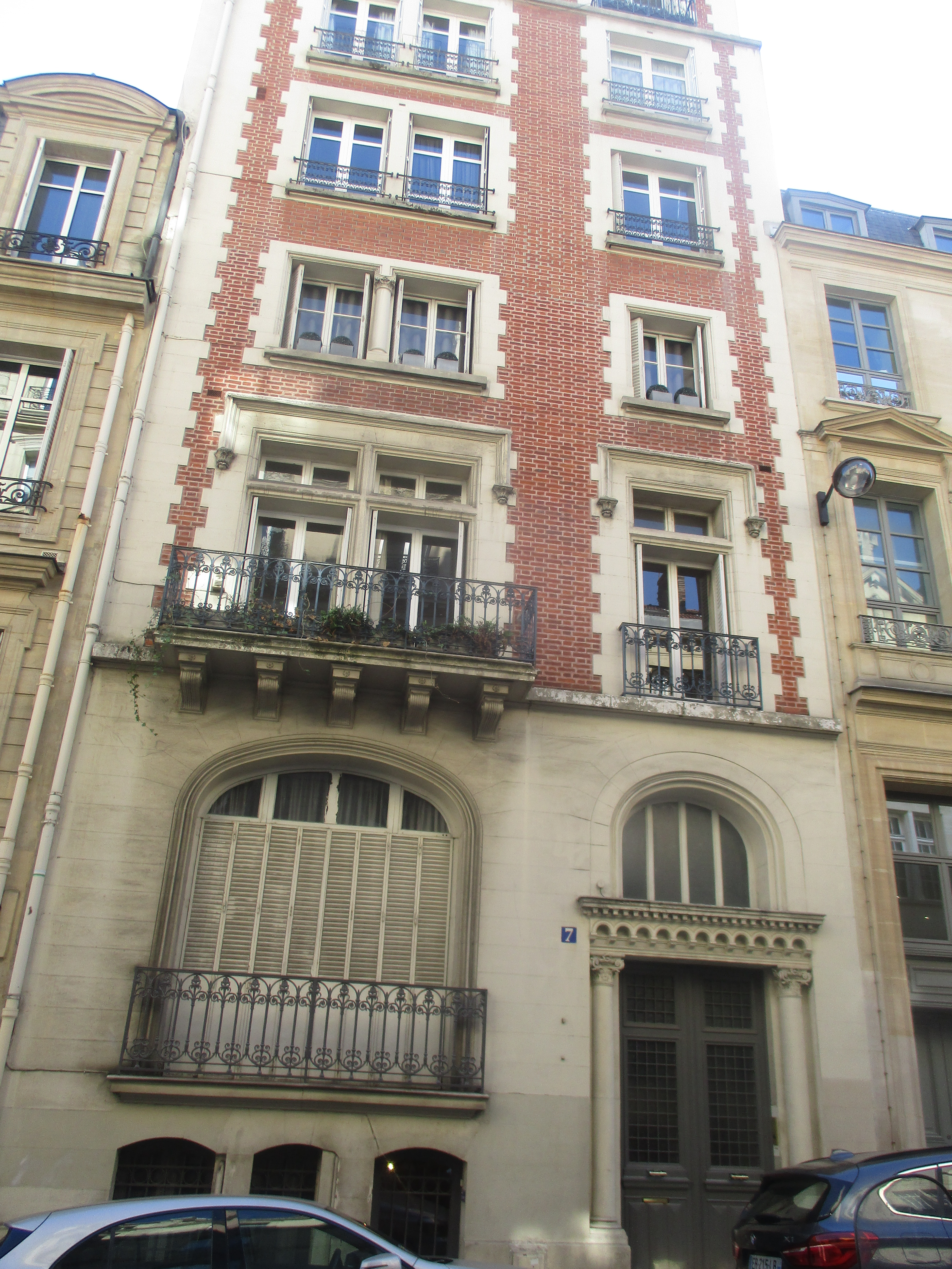 7 rue Christophe-Colomb, Paris VIIe. Hôtel particulier de Madeleine Deslandes (1866-1929).